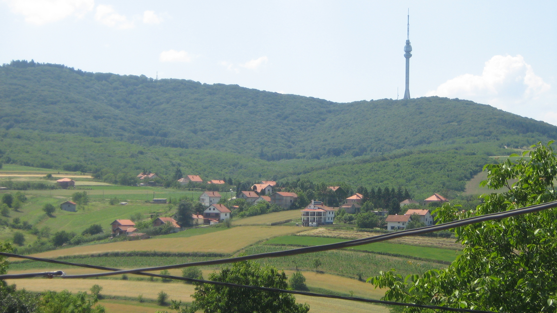 Avala из Зуца